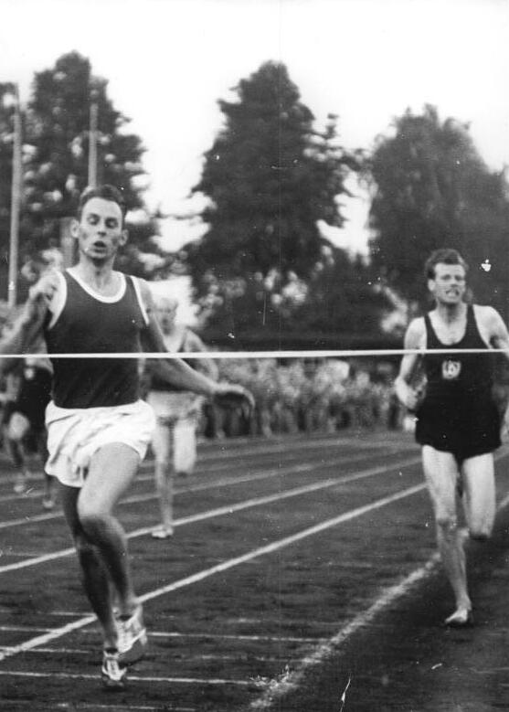 Horst Mann, Willi Bromberger Zentralbild TBD-Wehse 14.9.1955 -3165- VI. Leichtathletik-Meisterschaften der Deutschen Demokratischen Republik vom 2. bis 5.9.1955 UBz: 400 m Lauf der Männer - Horst Mann, Wiss. Greifswald (l) (47,8) wurde DDR-Meister vor Werner Schneider, Dynamo Berlin, und Willi Bromberger, Dynamo Berlin (rechts) (48,3 sec.)